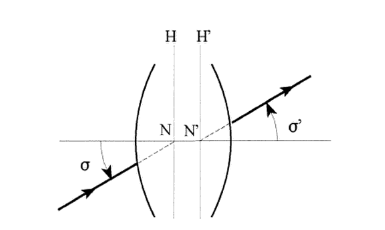 Fórmula física del punt nodal